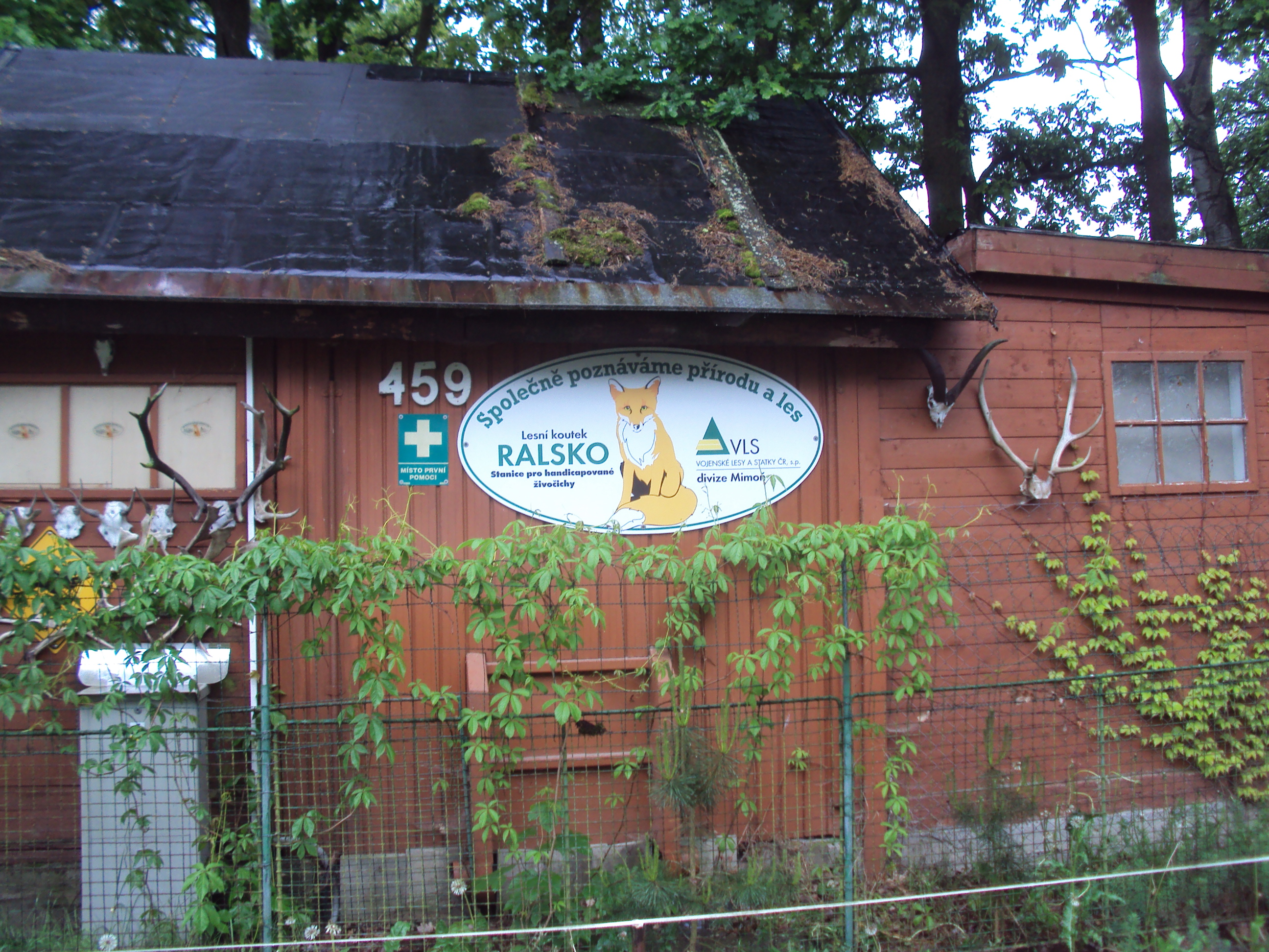 Lesní koutek Ralsko v Hradčanech